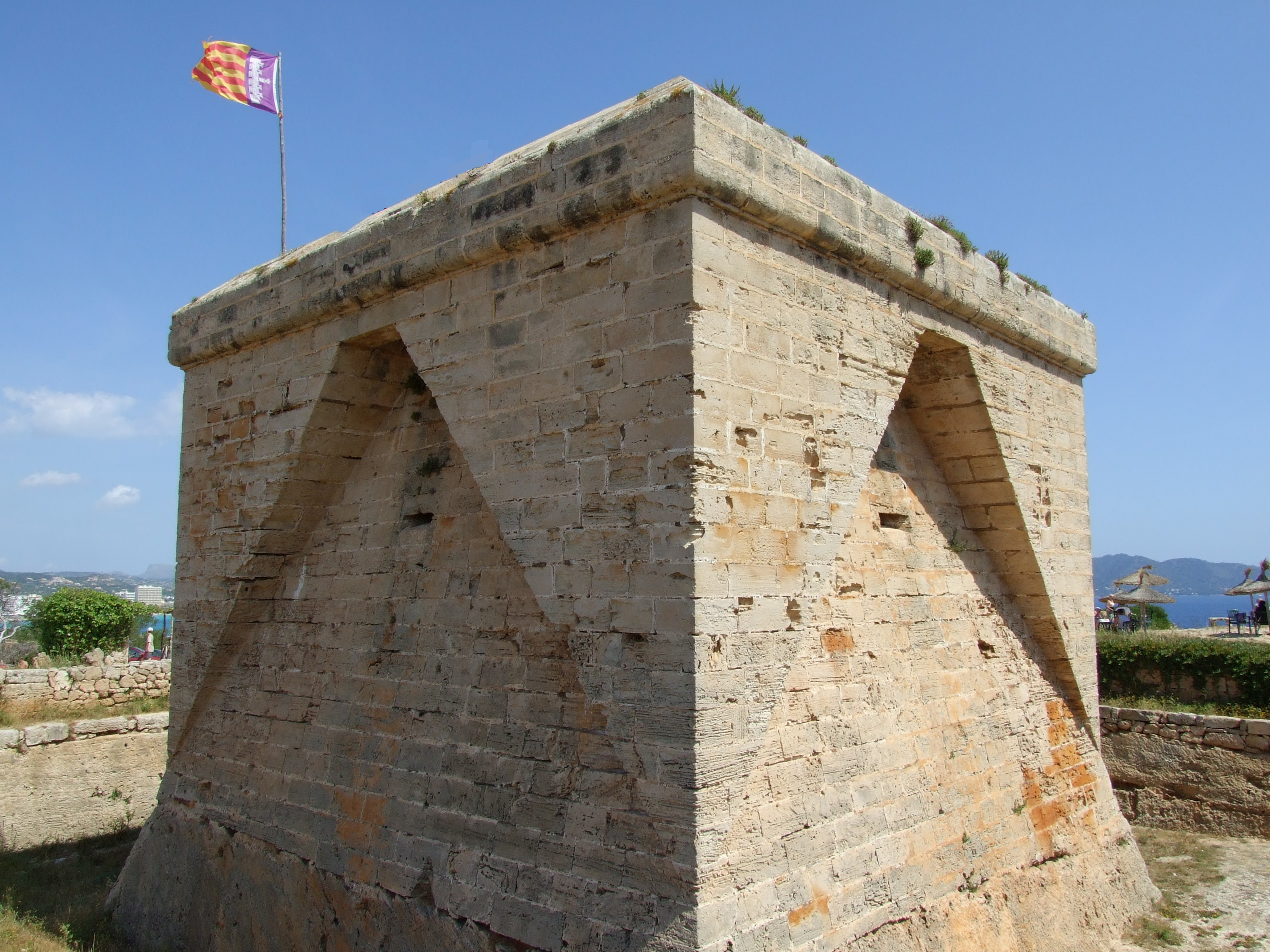 Punta de n'Amer / Mallorca